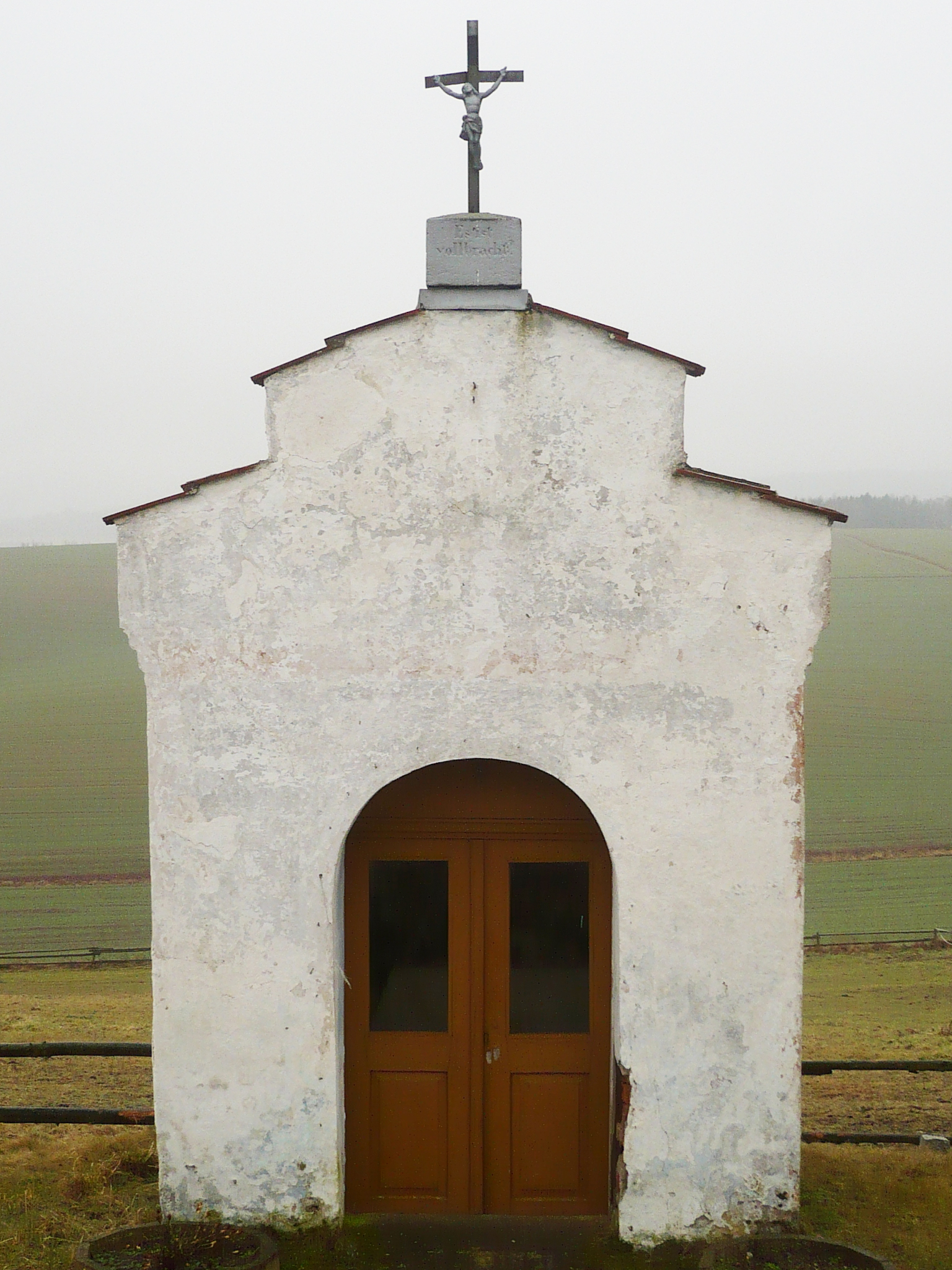 Szuszyna. Front kaplicy